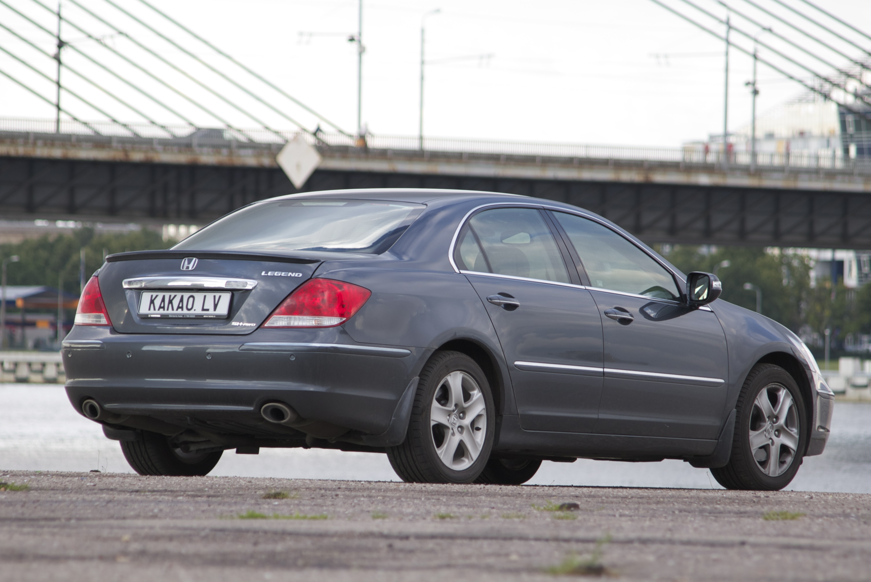 Honda Legend 2007 109